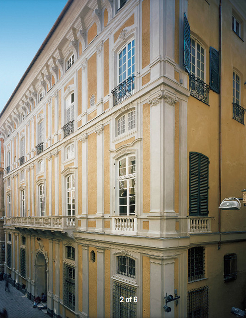 Palazzo Doria Via Garibaldi 6 Genova